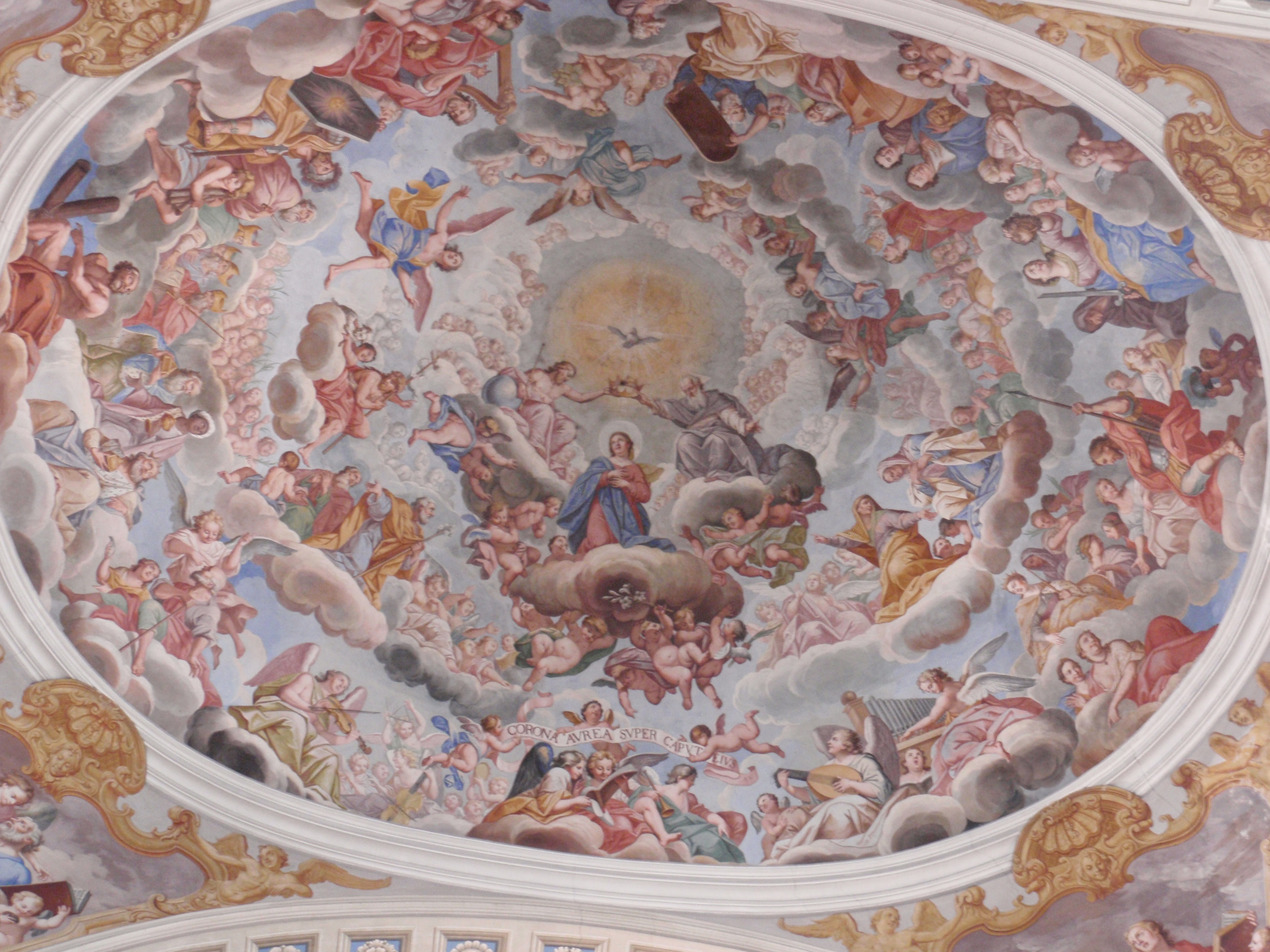 Giuseppe Mattia Borgnis, Tripudio per Maria Assunta in Cielo. Affresco nel catino della Chiesa Parrocchiale di Santa Maria Maggiore.